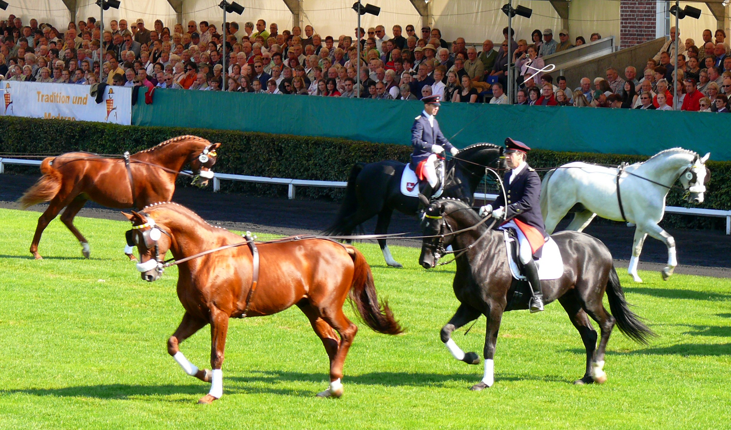 "Zweifache Fahrschule" bei der Hengstparade am 25.9.2011, ein Reiter führt ein weiteres Pferd, das vor ihm geht.